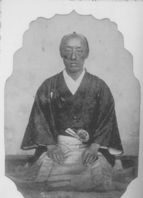 徳川慶勝 Tokugawa Yoshikatu.湿板写真。慶勝39歳の写真。